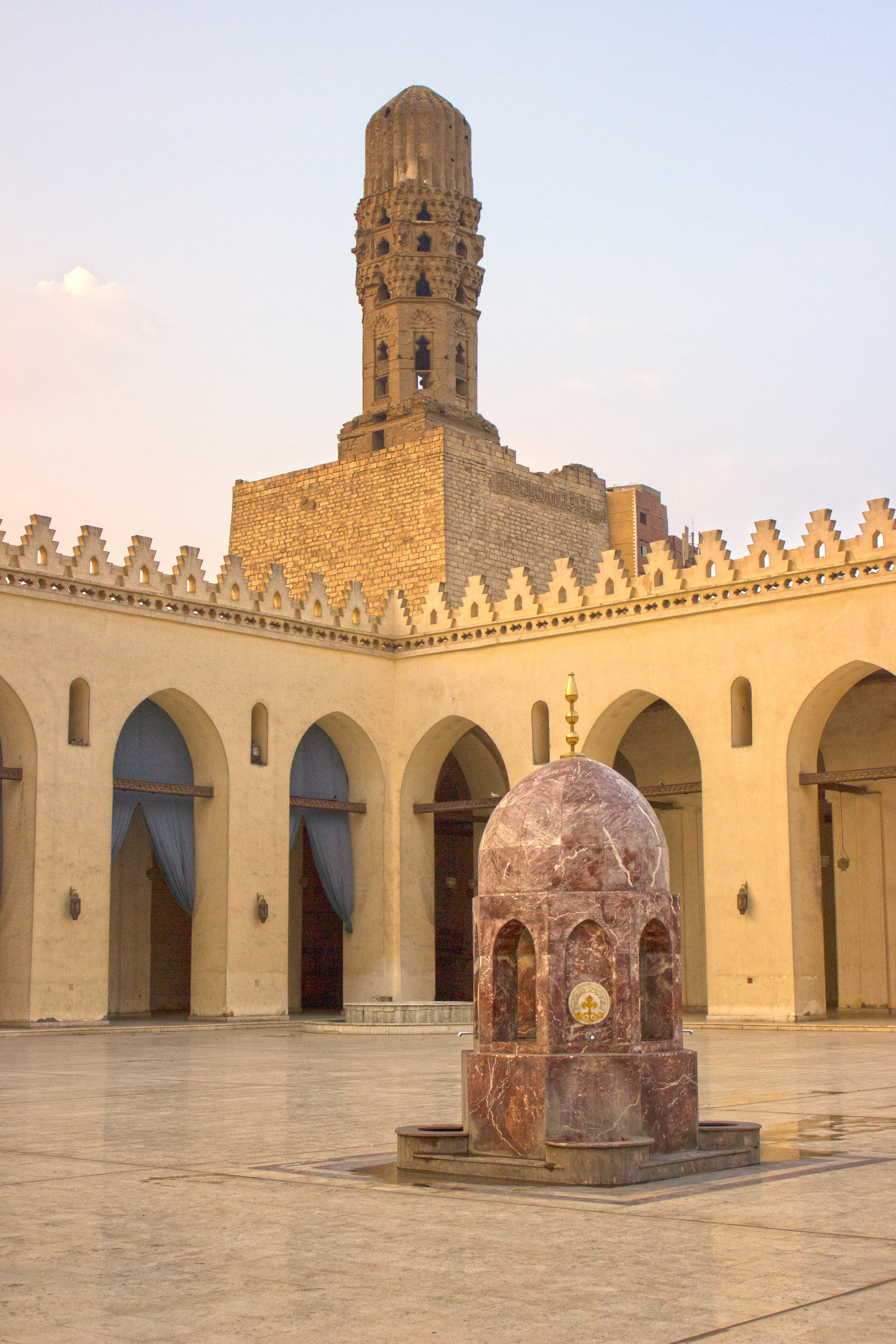 جامع الحاكم بأمر الله